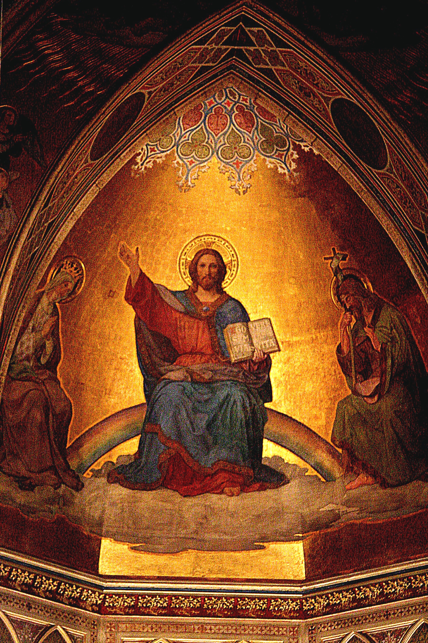 Christusbild in der Altarapsis der Apollinariskirche in Remagen (Mitte 19. Jh.)